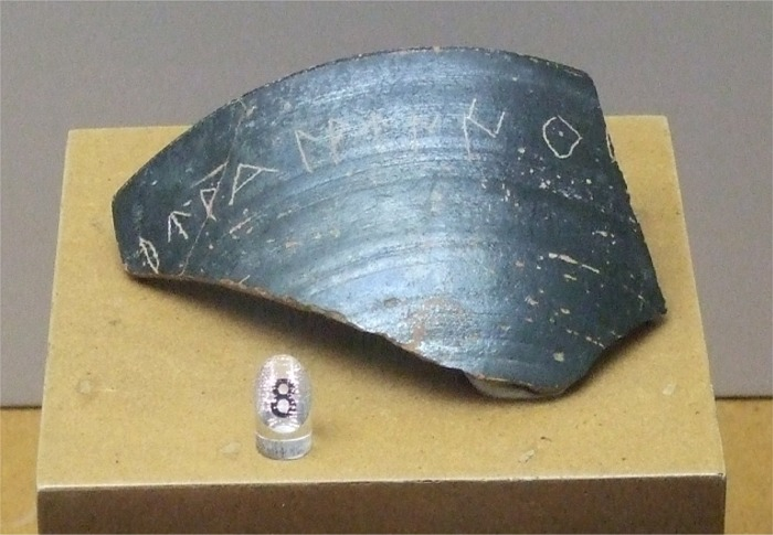 (8) Grafito sobre cerámica campaniense, ... aun kalaunicu... (siglo I adC). Botorrita (Zaragoza). Museo de Zaragoza